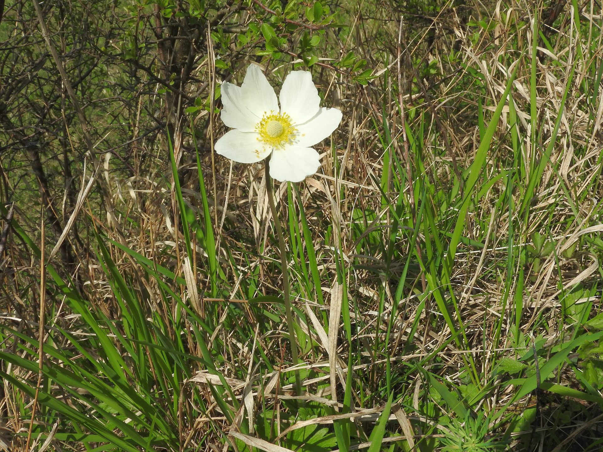 Naturschutzgebiet Beim Roten Kreuz, 12.04.2016